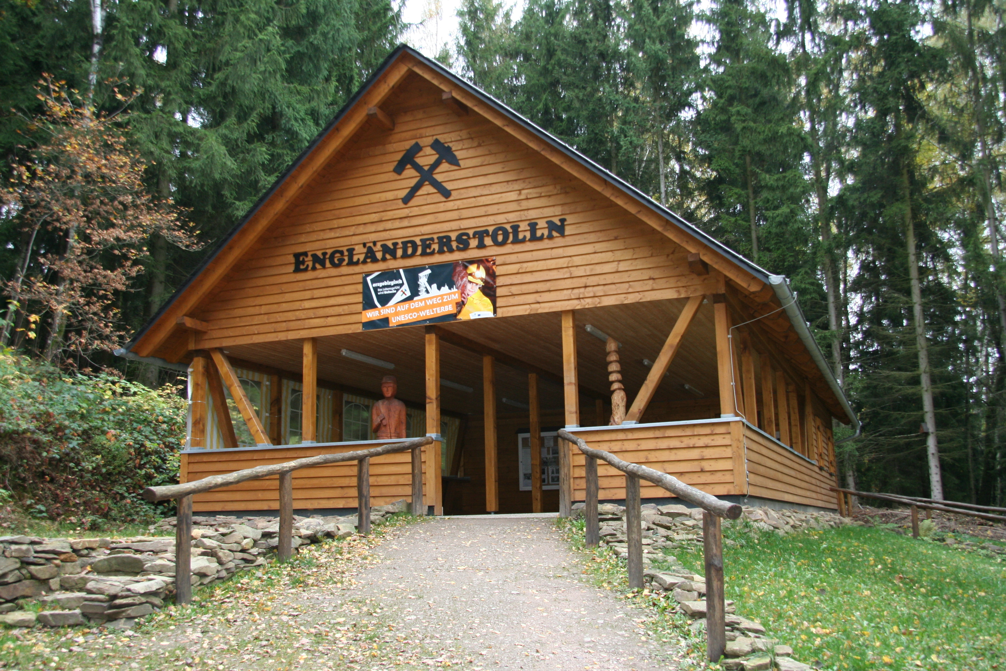 neu errichtetes Huthaus des Engländerstollens